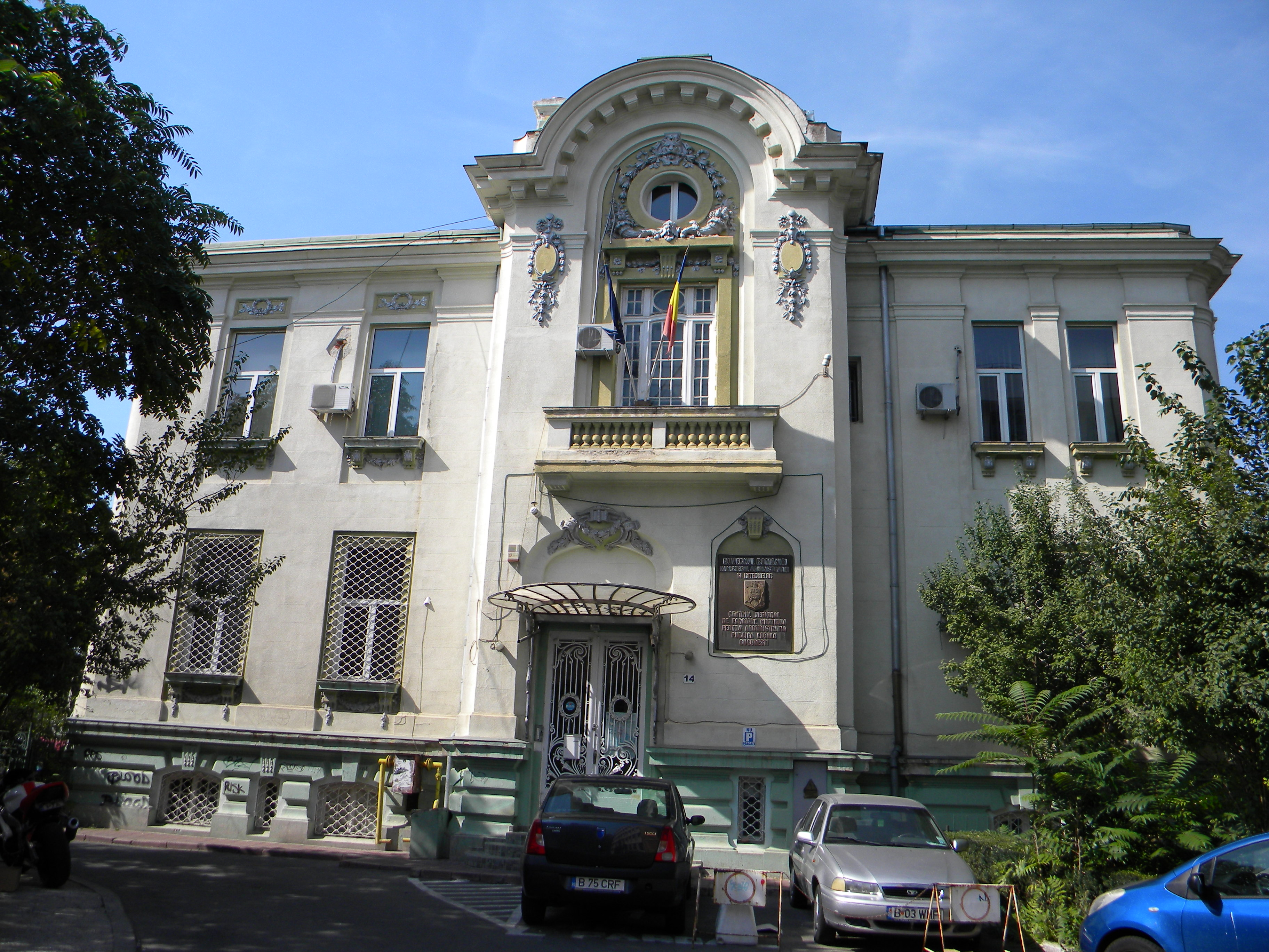 Bucuresti, Romania, Casa pe Str. Occidentului nr. 14, sect. 1